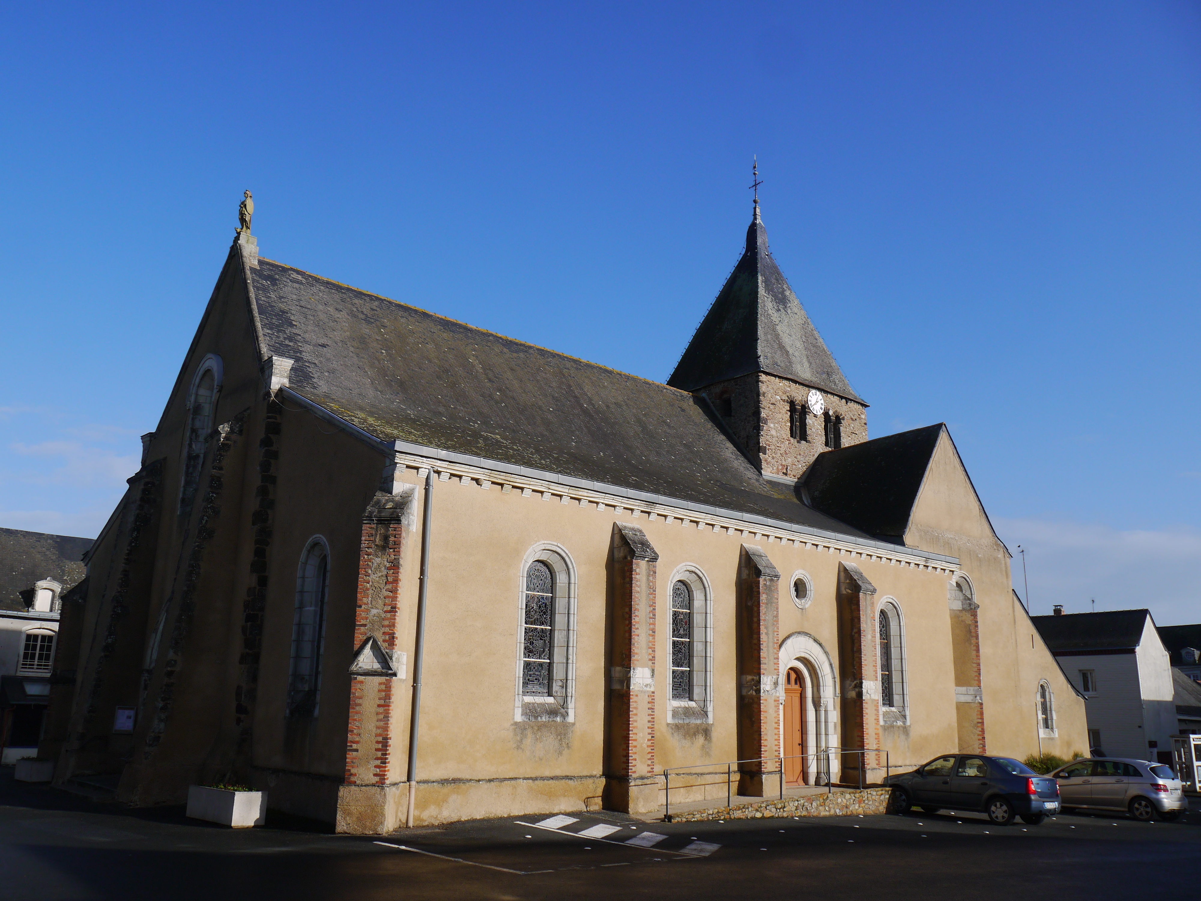 L'église Saint-Julien.